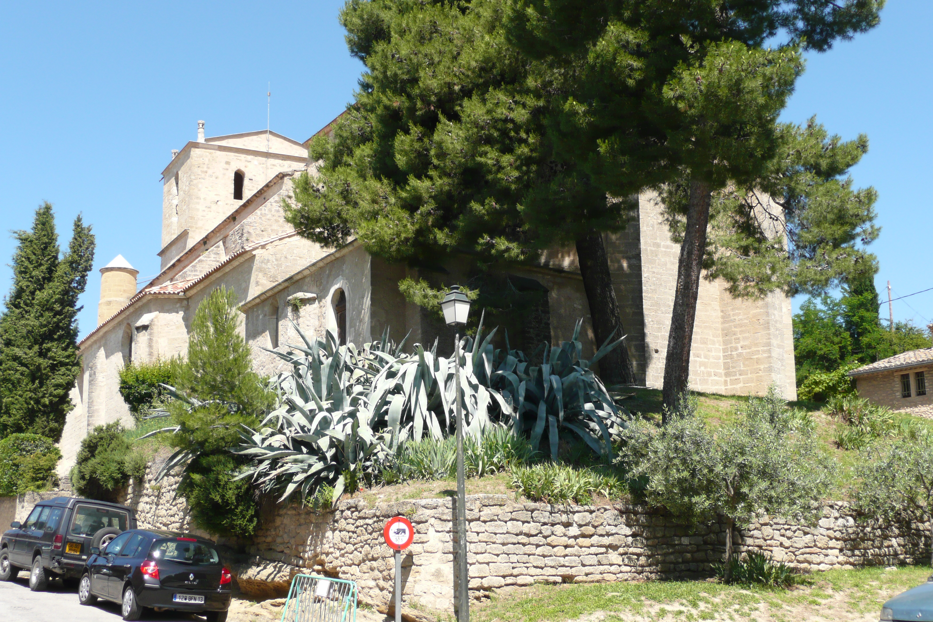 Église Notre-Dame-de-Beaulieu de Cucuron (Vaucluse, France).